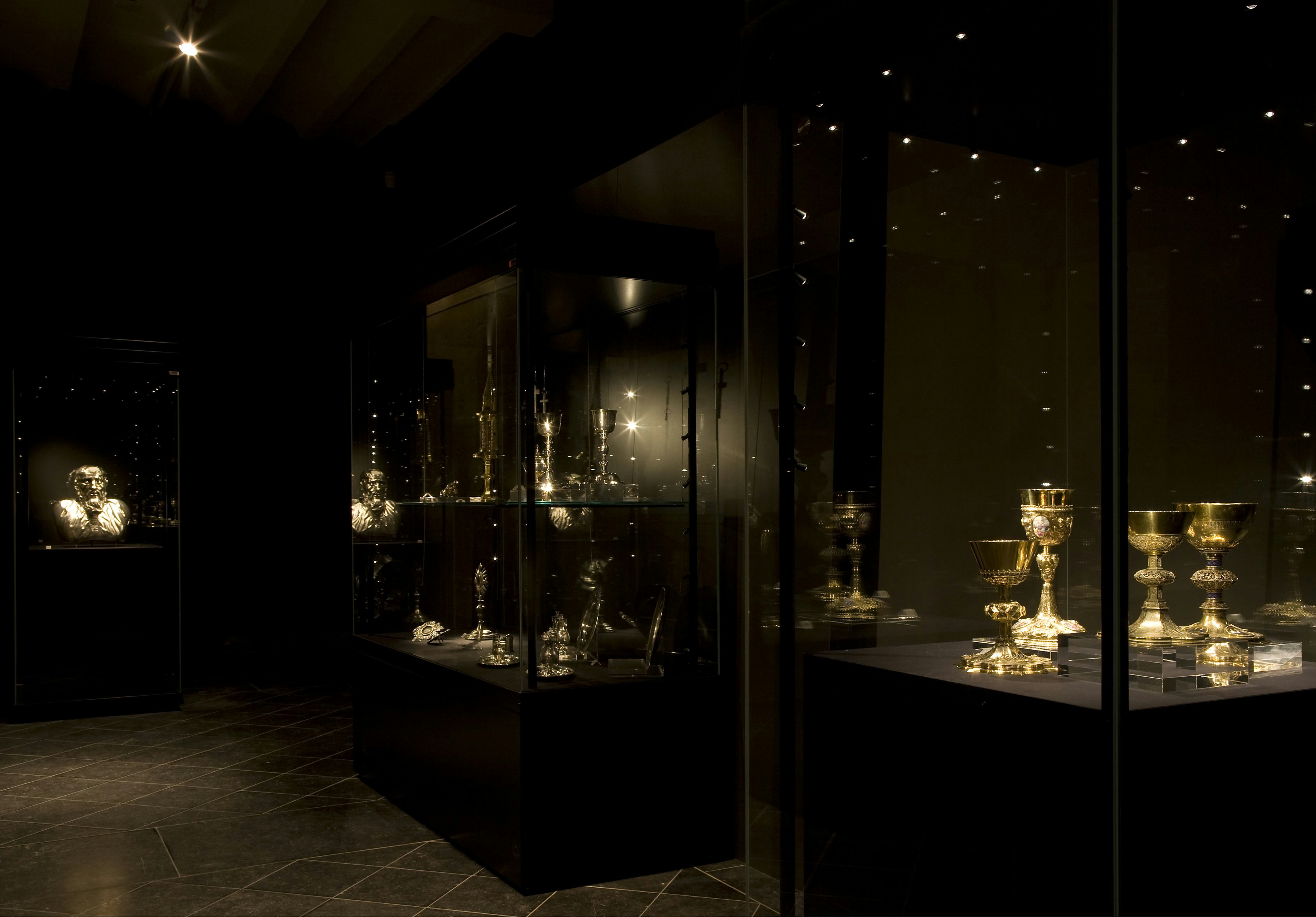 Sint Gerlachuskerk: Interieur, overzicht van de schatkamer (opmerking: Gefotografeerd voor publikatie voor het boek Heiligdom / Sanctuary Sint Gerlach.)